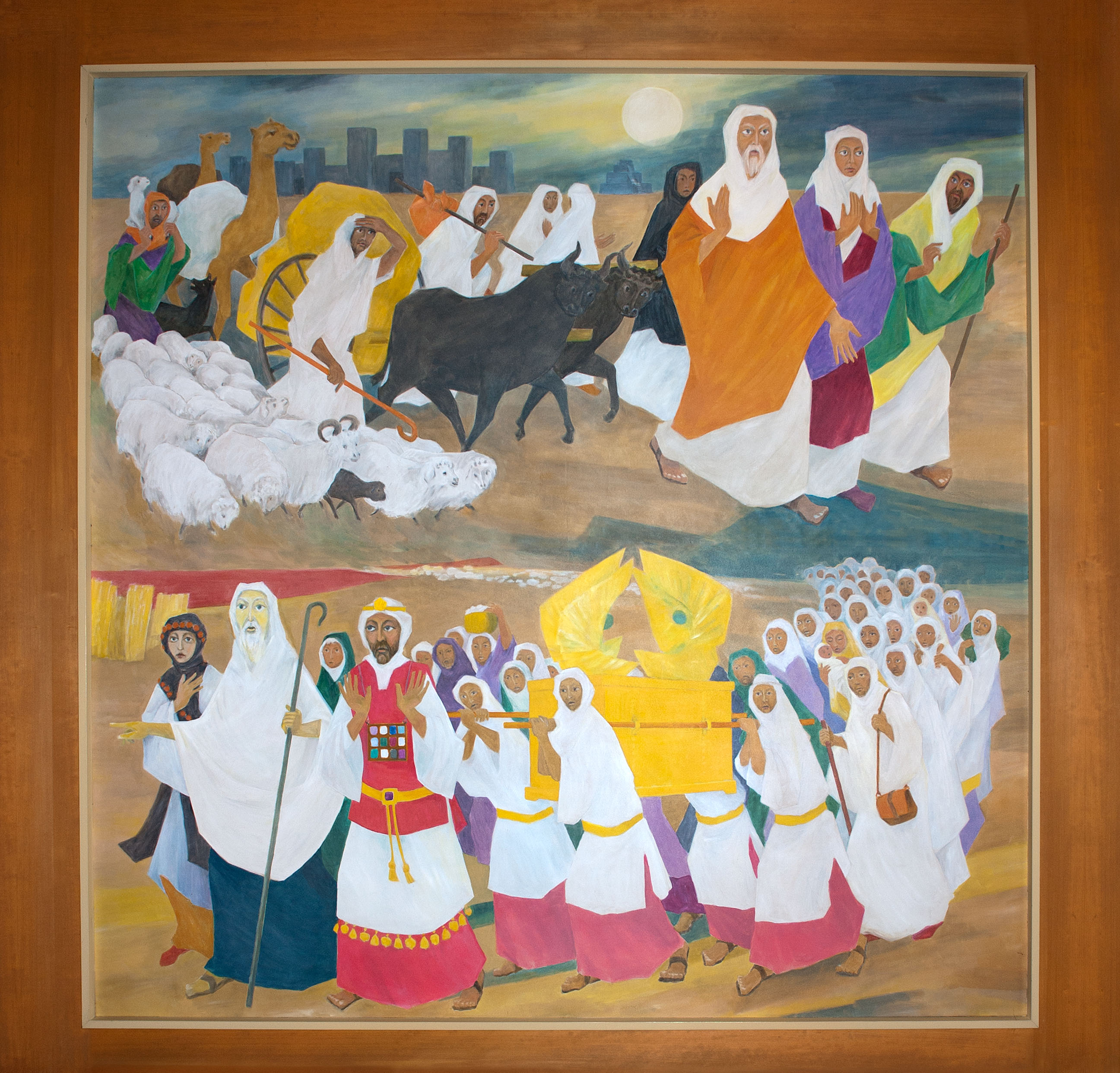 Römisch-katholische Pfarrkirche St. Antonius Egg, Deckengemälde Abraham